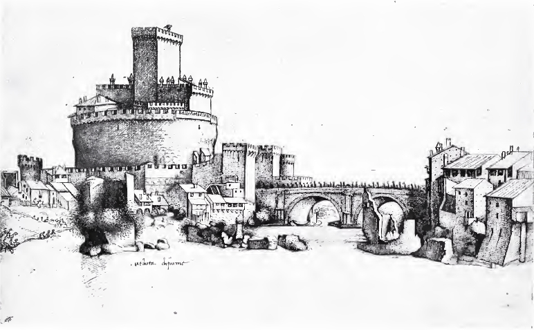 Das Castel Sant'Angelo auf einer Zeichnung aus dem Codex escurialensis aus der Werkstatt Domenico Ghirlandaios um 1495.